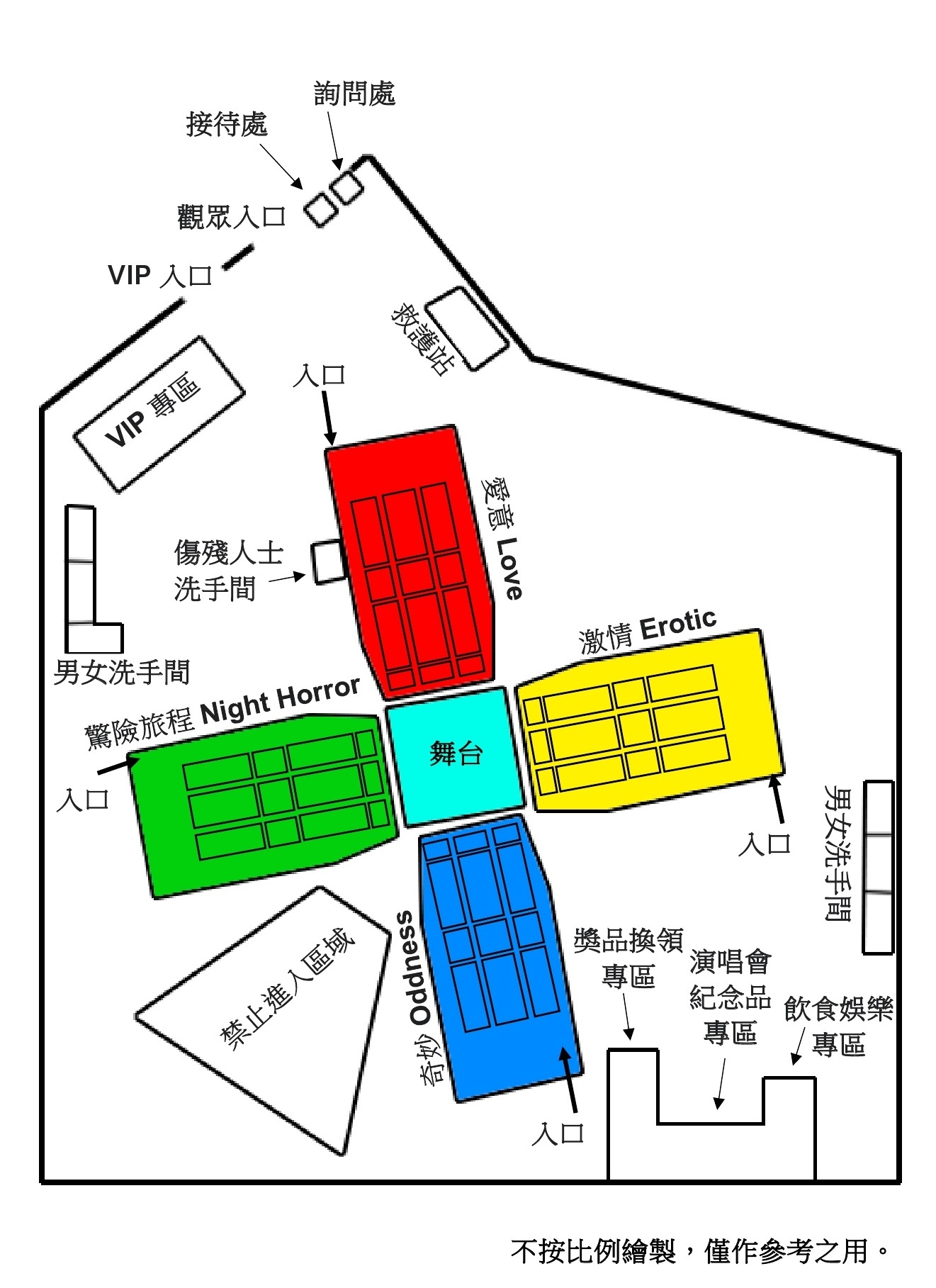 這是《黎明Leon 30th Anniversary Random Love Songs 4D in Live 2016》舞台和觀眾席的分佈形式